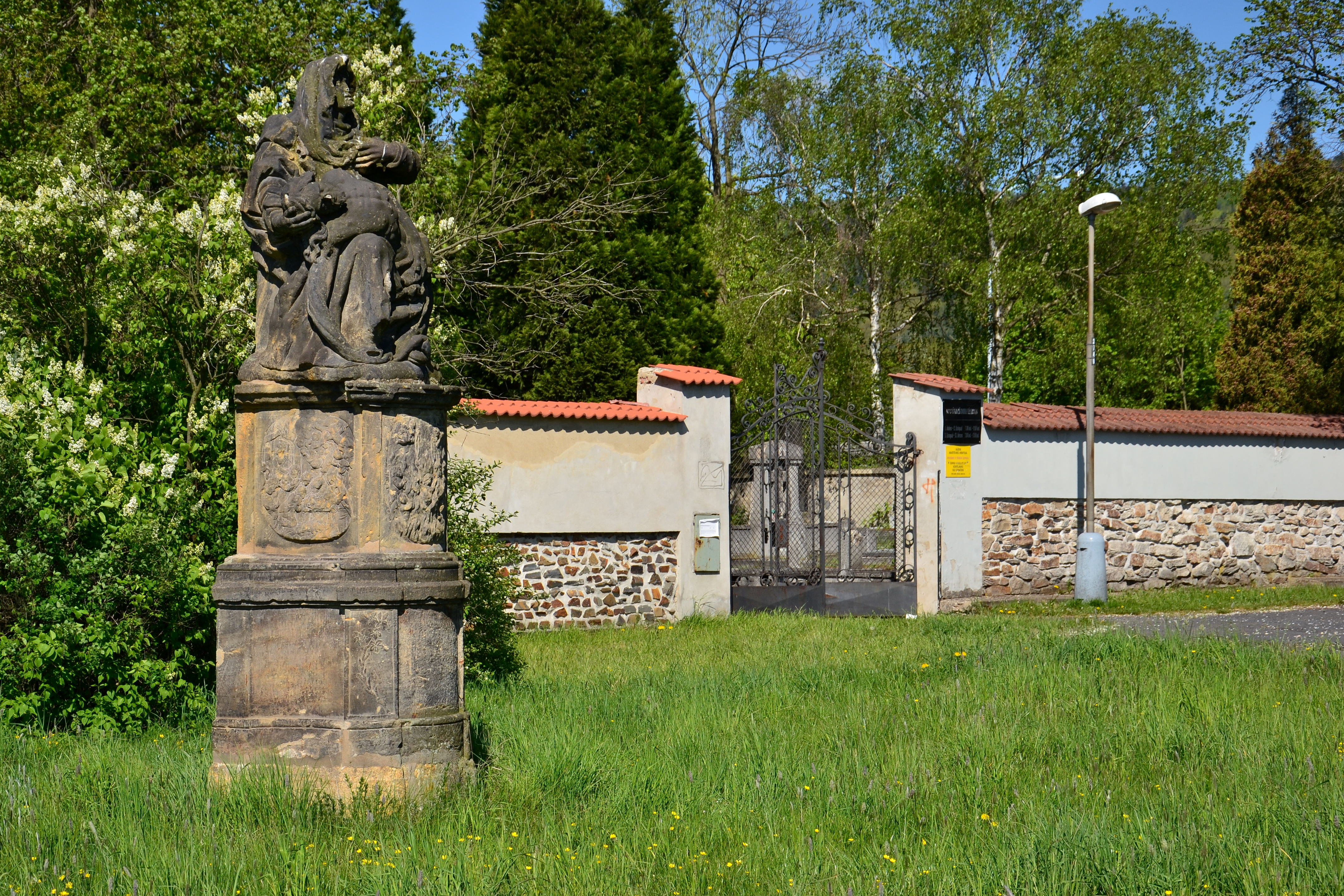 Sousoší Piety, Chomutov.